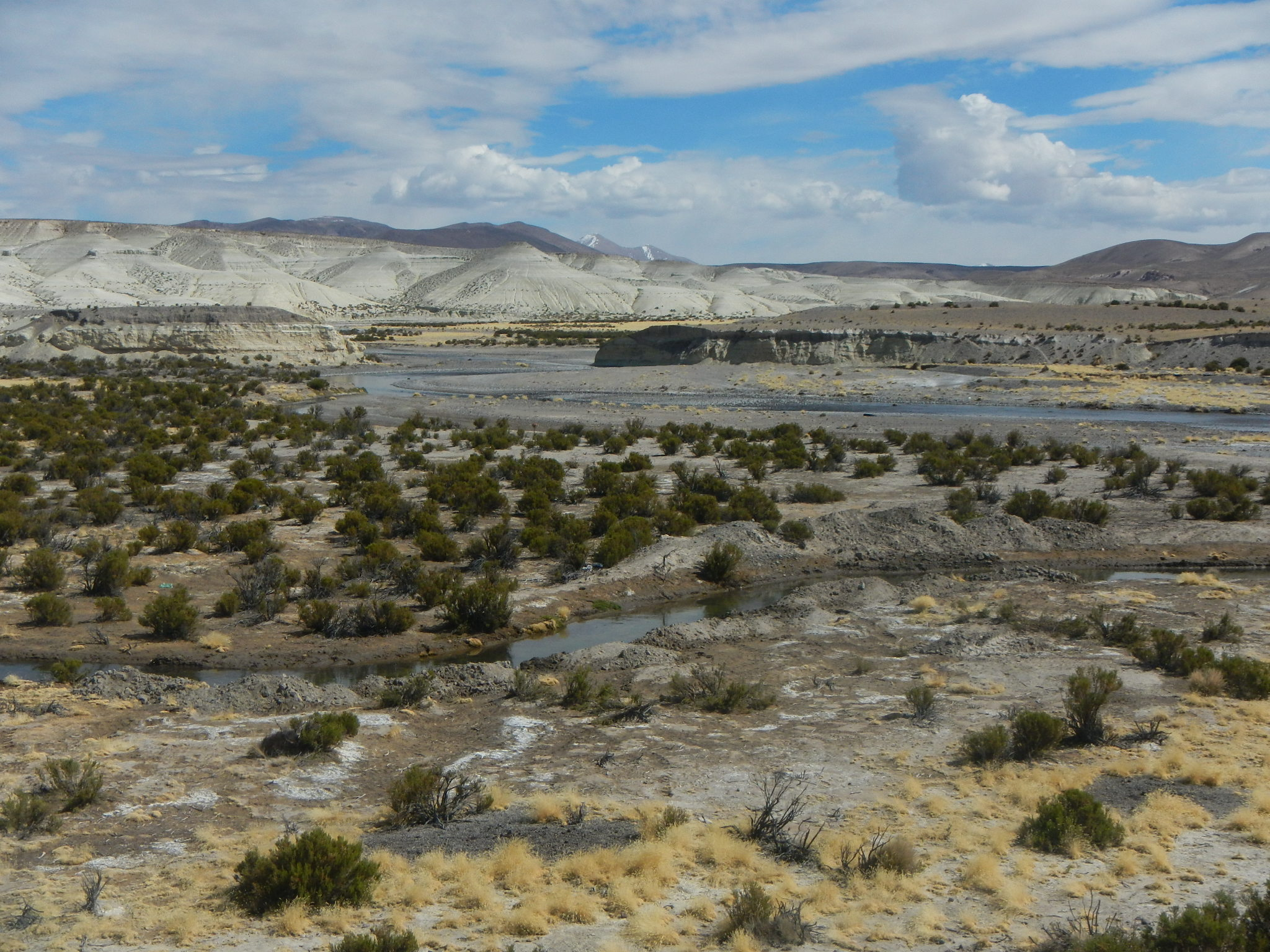 El río Lauca nace en el bofedal de Parinacota y muere en el salar de Coipasa en Bolivia.